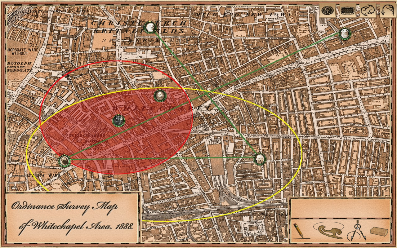 Capture d'écran du jeu Sherlock Holmes contre Jack l'Éventreur. Il s'agit ici de la carte utilisée par Holmes dans le jeu pour replacer les lieux où les différentes victimes ont été retrouvées. En recoupant un ensemble d'éléments de l'enquête, Holmes parvient à localiser la zone d'habitation du tueur : il s'agit du quartier d'Aldgate, ici coloré en rouge.